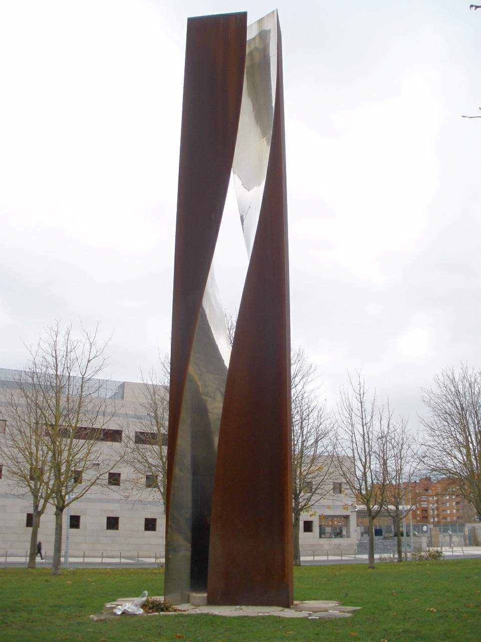 Monumento a las Victimas de ETA, en la calle Portal de Foronda (distrito de Lakua) de Vitoria-Gasteiz